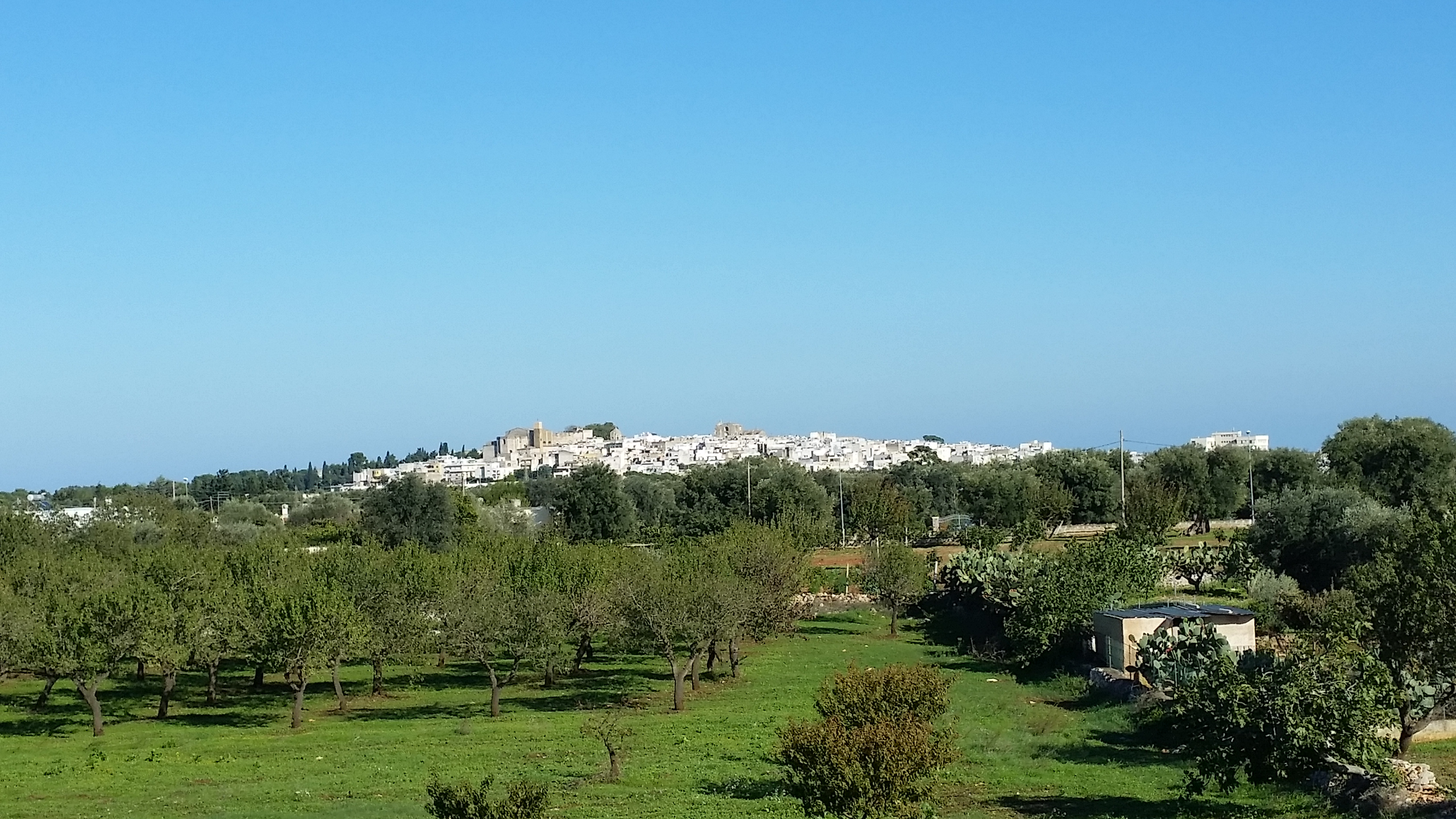 Panorama di Carovigno(BR) da contrada Polinisso